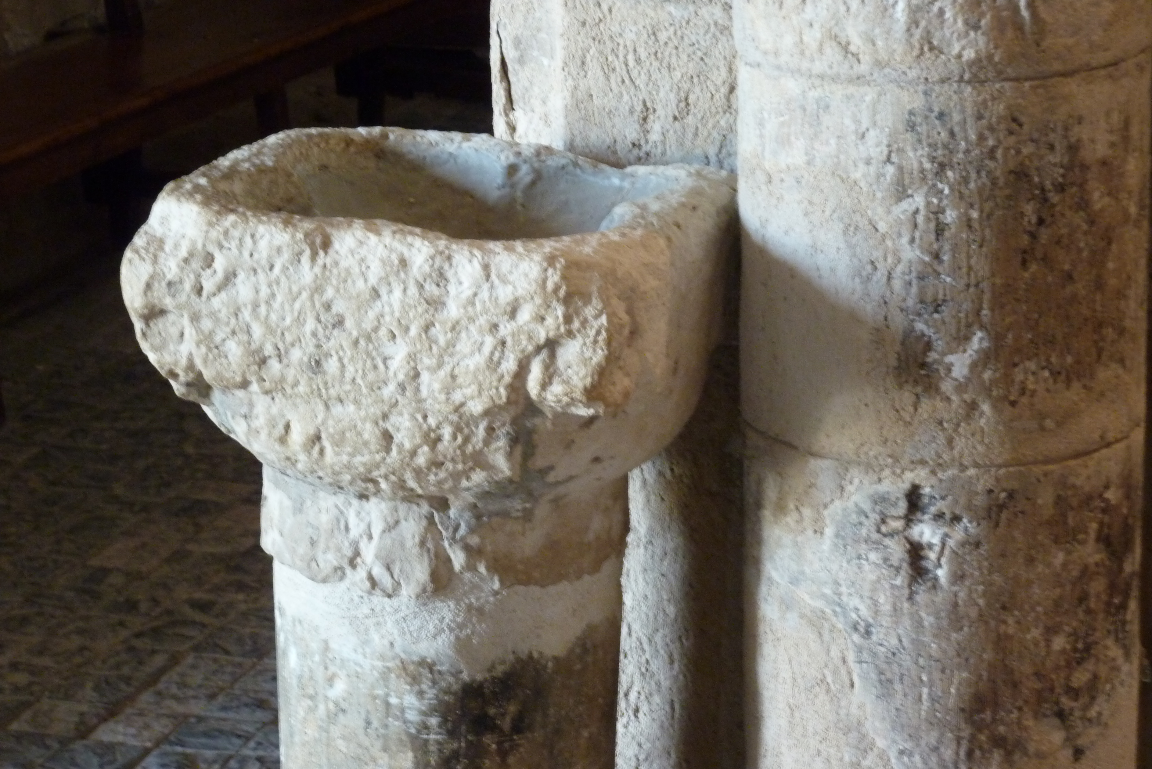 Santa María de Wamba, ein zum Weihwasserbecken umfunktioniertes Kapitell